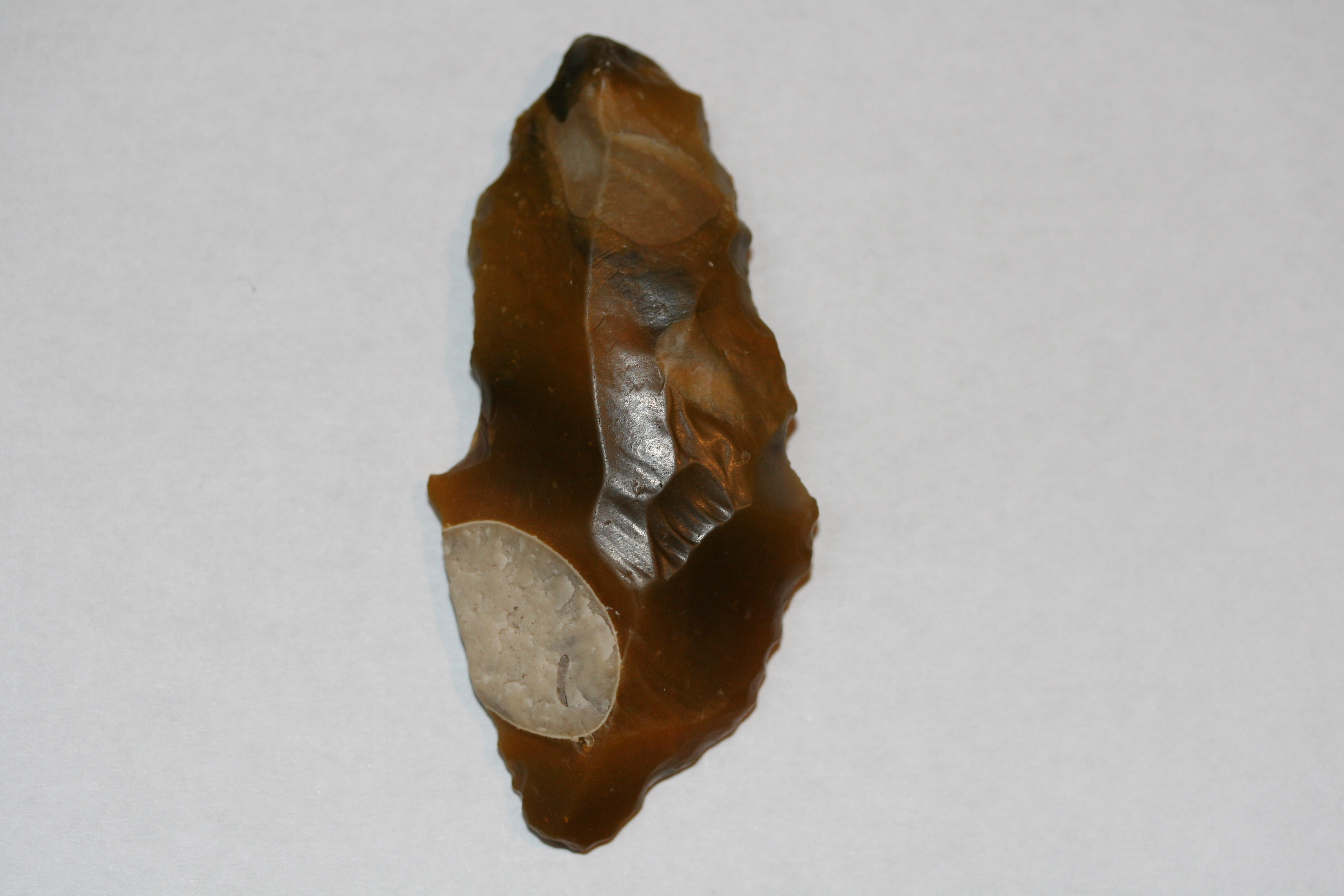 Feuersteinklinge